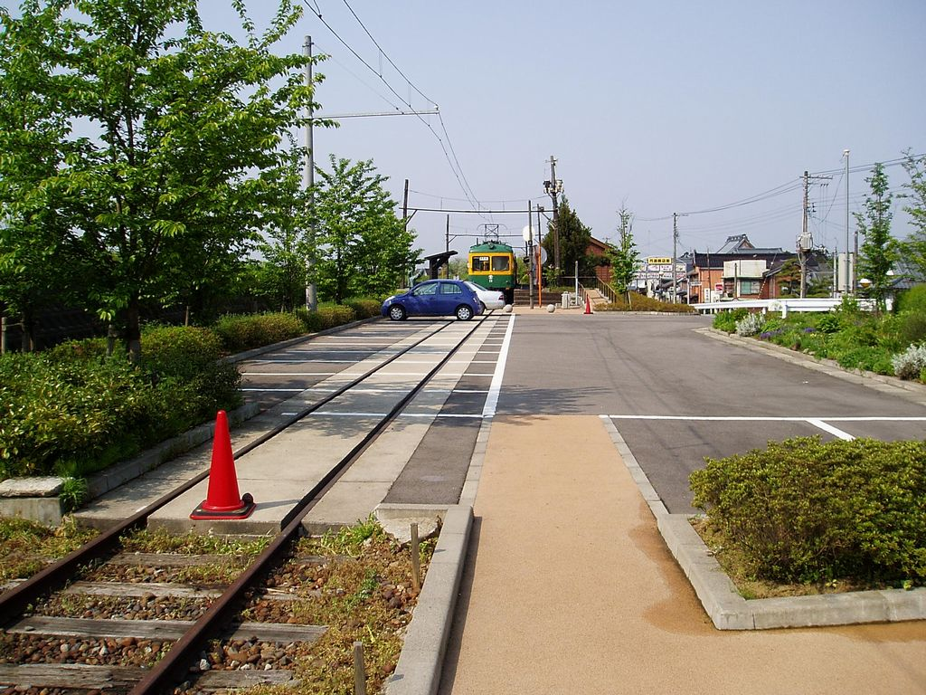 月潟駅構内遠景